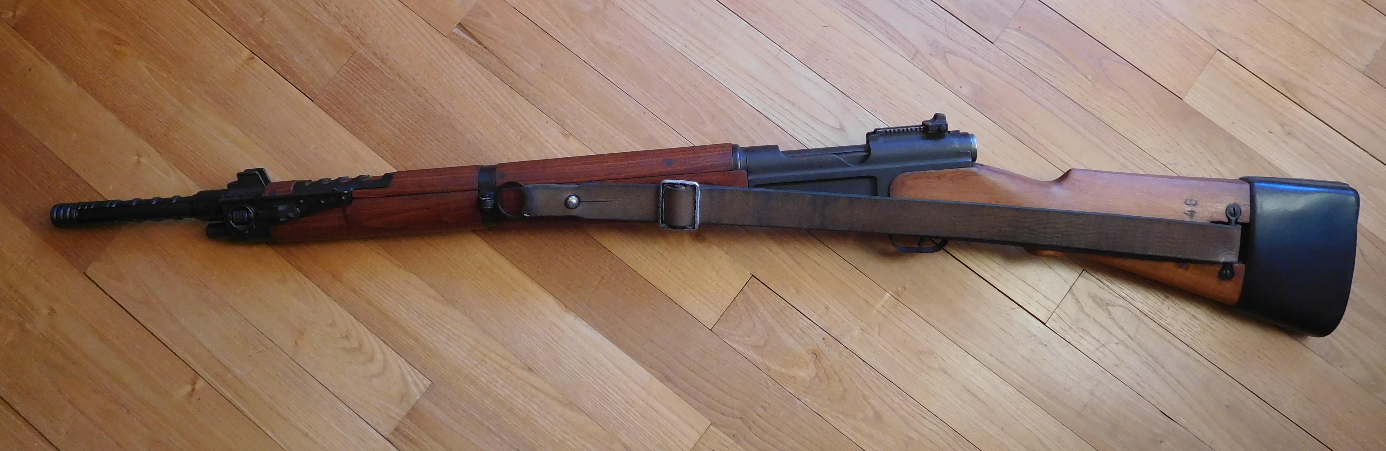 MAS 1936-51 (neutralisé) avec bretelle.